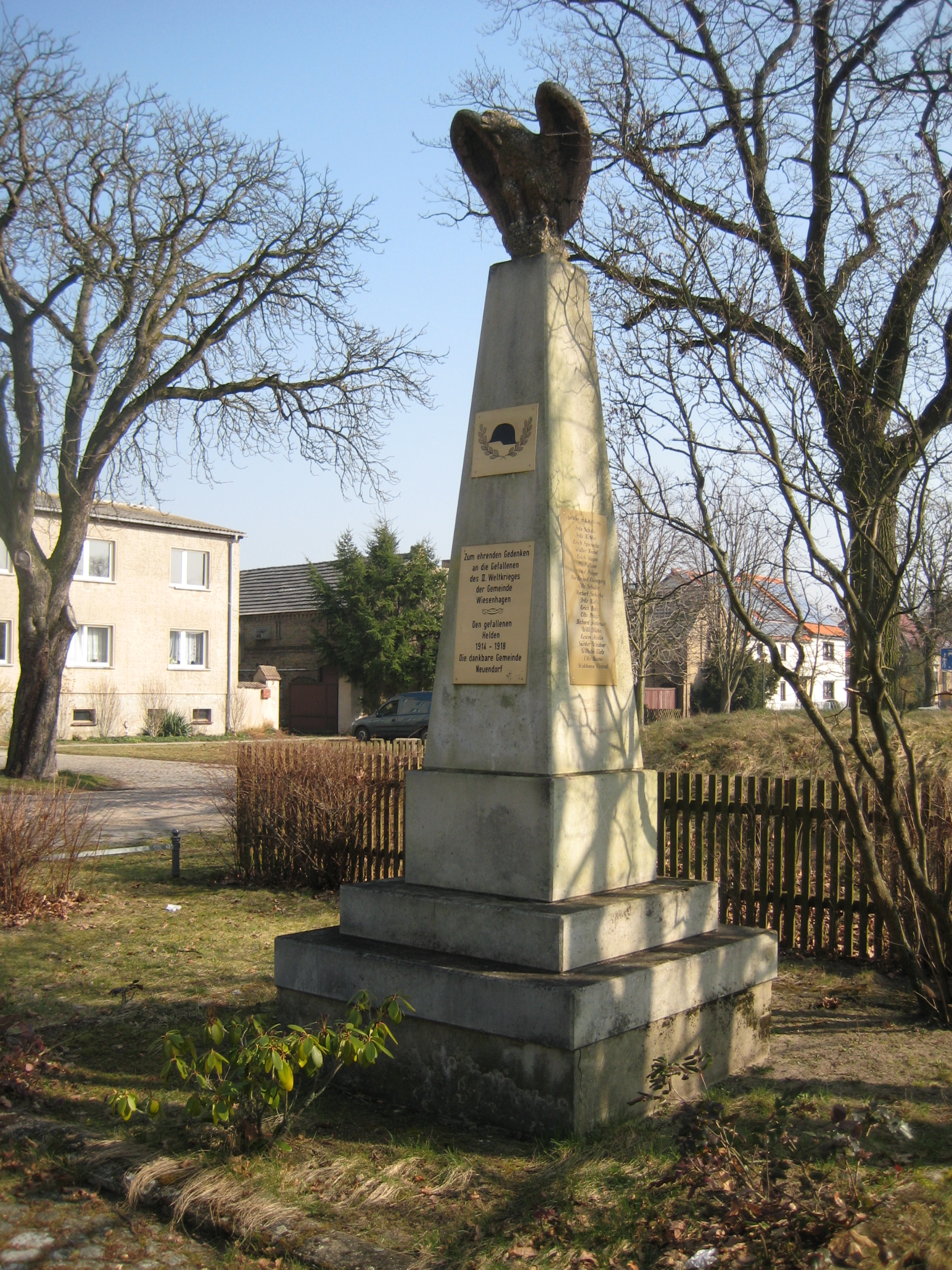 Denkmal Weltkriege - Wiesenhagen